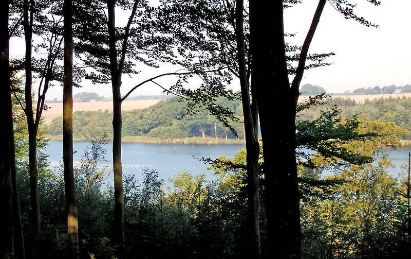 Søbygård Sø ved Hammel. (Gjern Herred Skanderborg Amt / Århus Amt, Denmark). Image by me: User Nico-dk / Nils jepsen